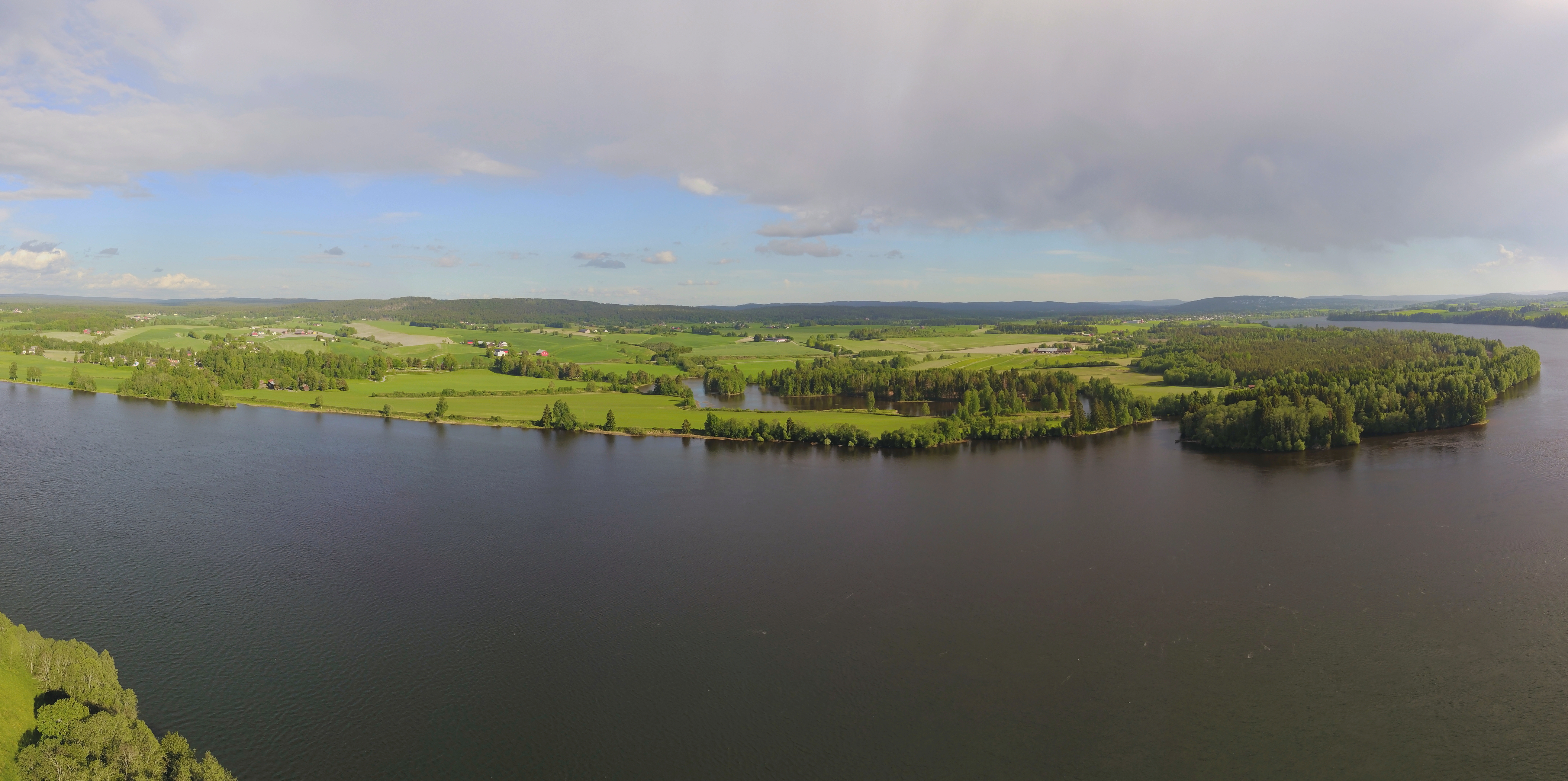 Beengen fuglefredningsområde i Nes